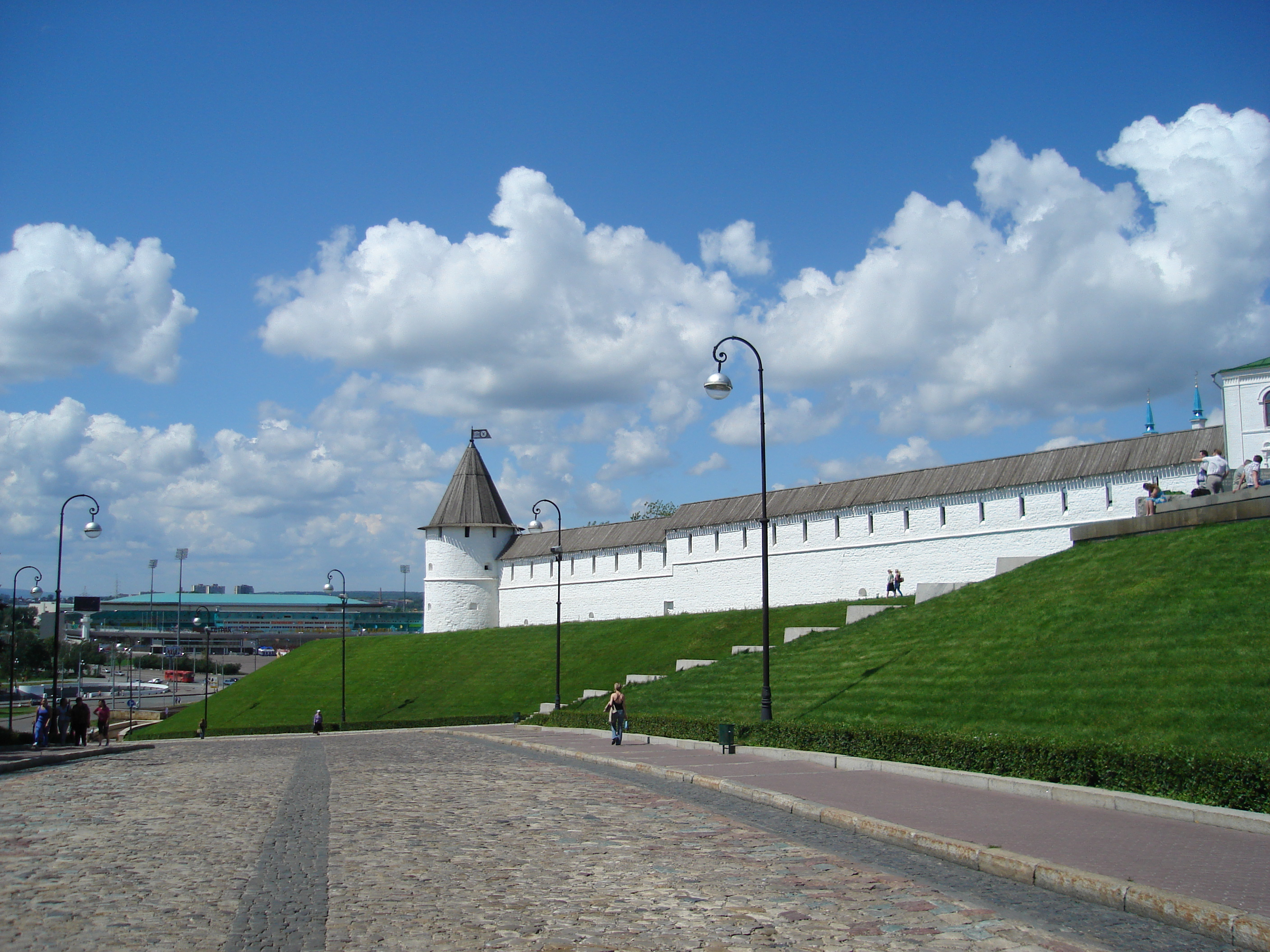 Kazan Kremlin